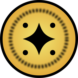 Bentuk Mata Shukaku